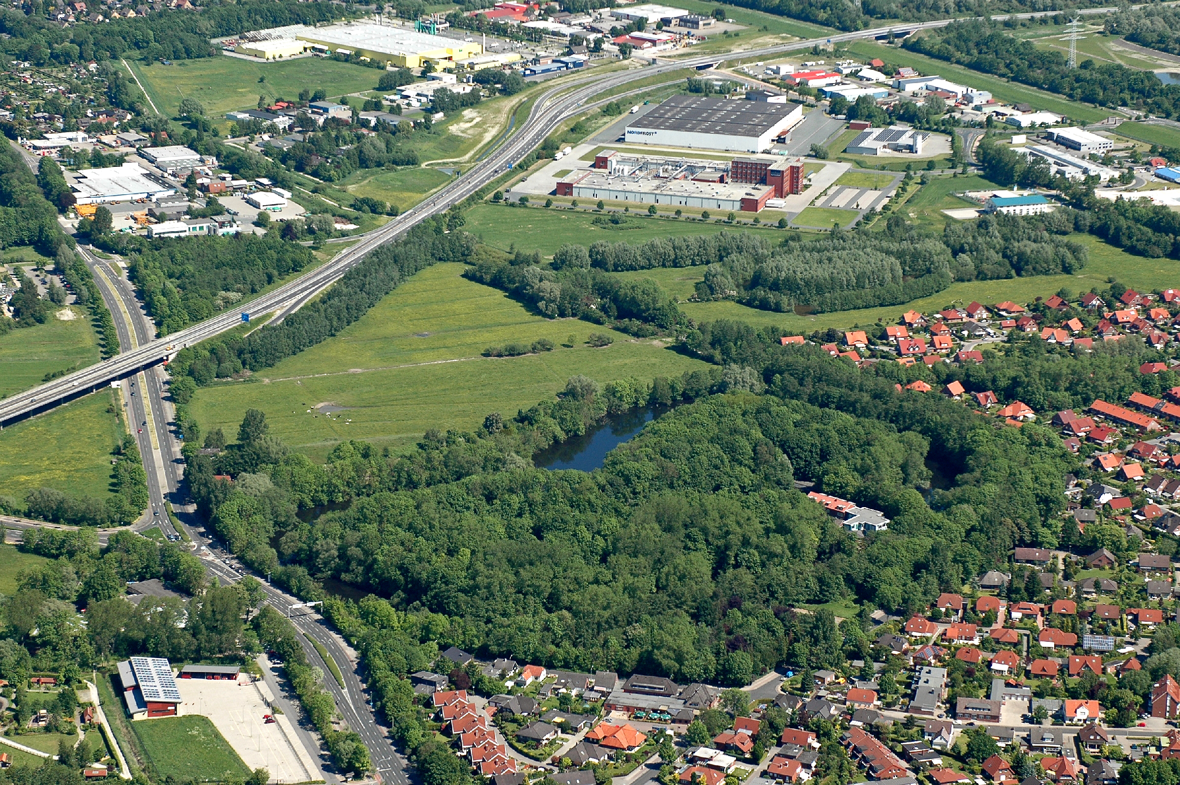 Fotoflug vom Flugplatz Nordholz-Spieka über Cuxhaven und Wilhelmshaven Hier zu sehen: Die A29 im nördlichen Stadtgebiet von Wilhelmshaven. Das Bild ist von Süden aufgenommen. Die A29 zieht sich von links mittig nach rechts oben durch das Bild. Links und rechts von ihr befindet sich Gewerbe, insbesondere die Lagerhallen der Firma Nordfrost und die Fischverarbeitungsanlage von Greenland Seafoods auf der rechten sowie der Marktkauf-Supermarkt und der MIOS-Lebensmittelgroßhandel auf der linken Seite. Im Vordergrund unten rechts ist der Wilhelmshavener Stadtteil Rüstersiel mit dem ehemaligen Fort Rüstersiel zu sehen.